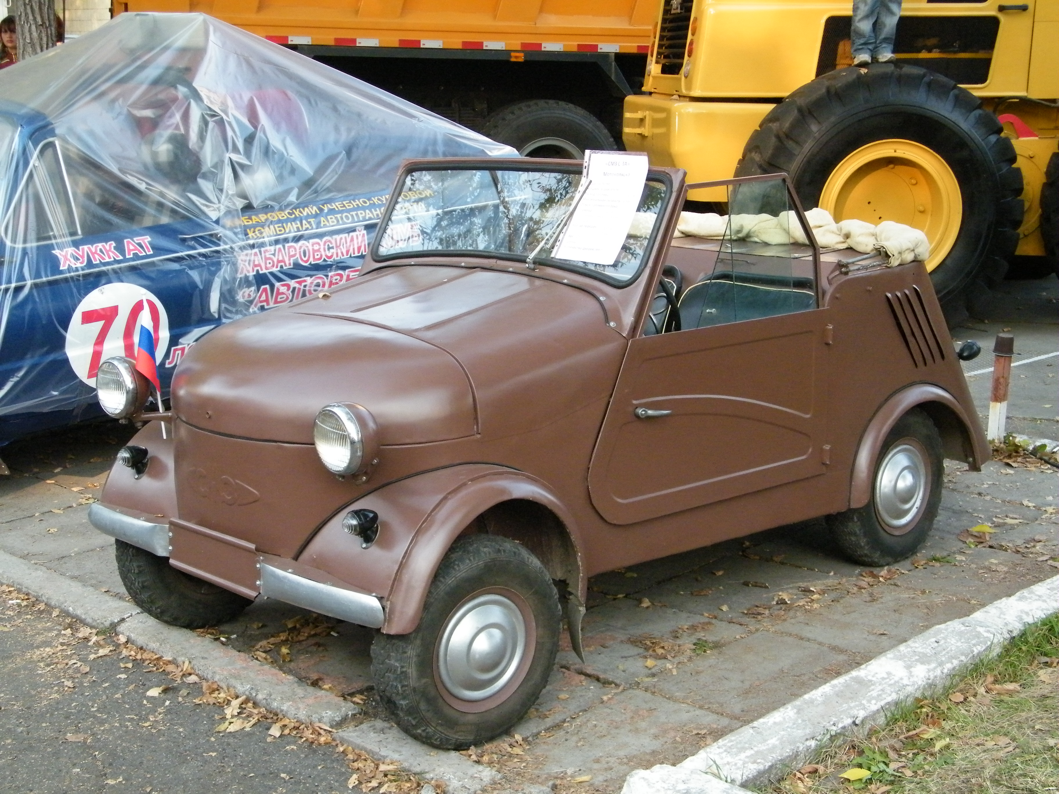 Моргуновка-мотоколяска